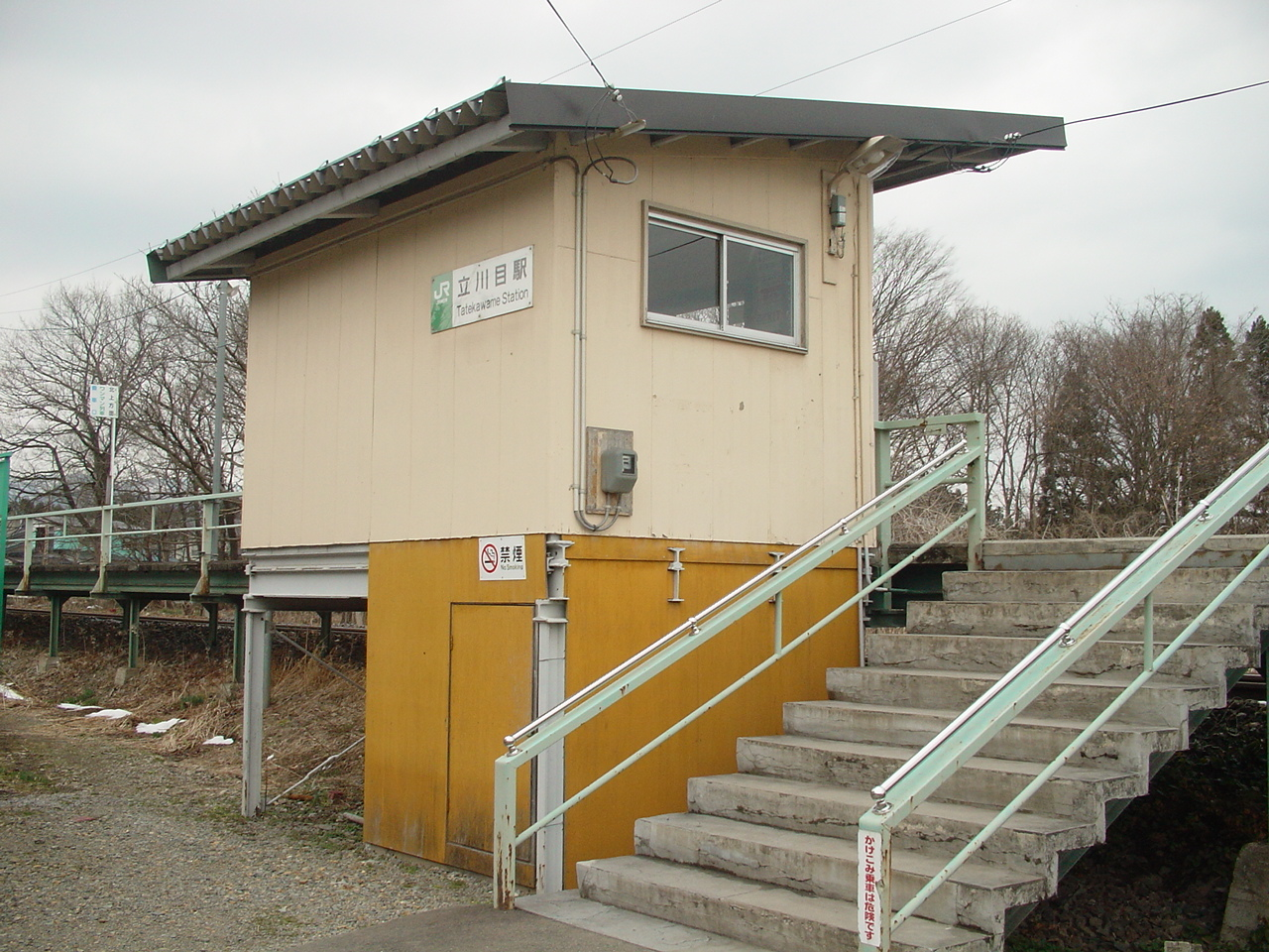 （立川目駅）